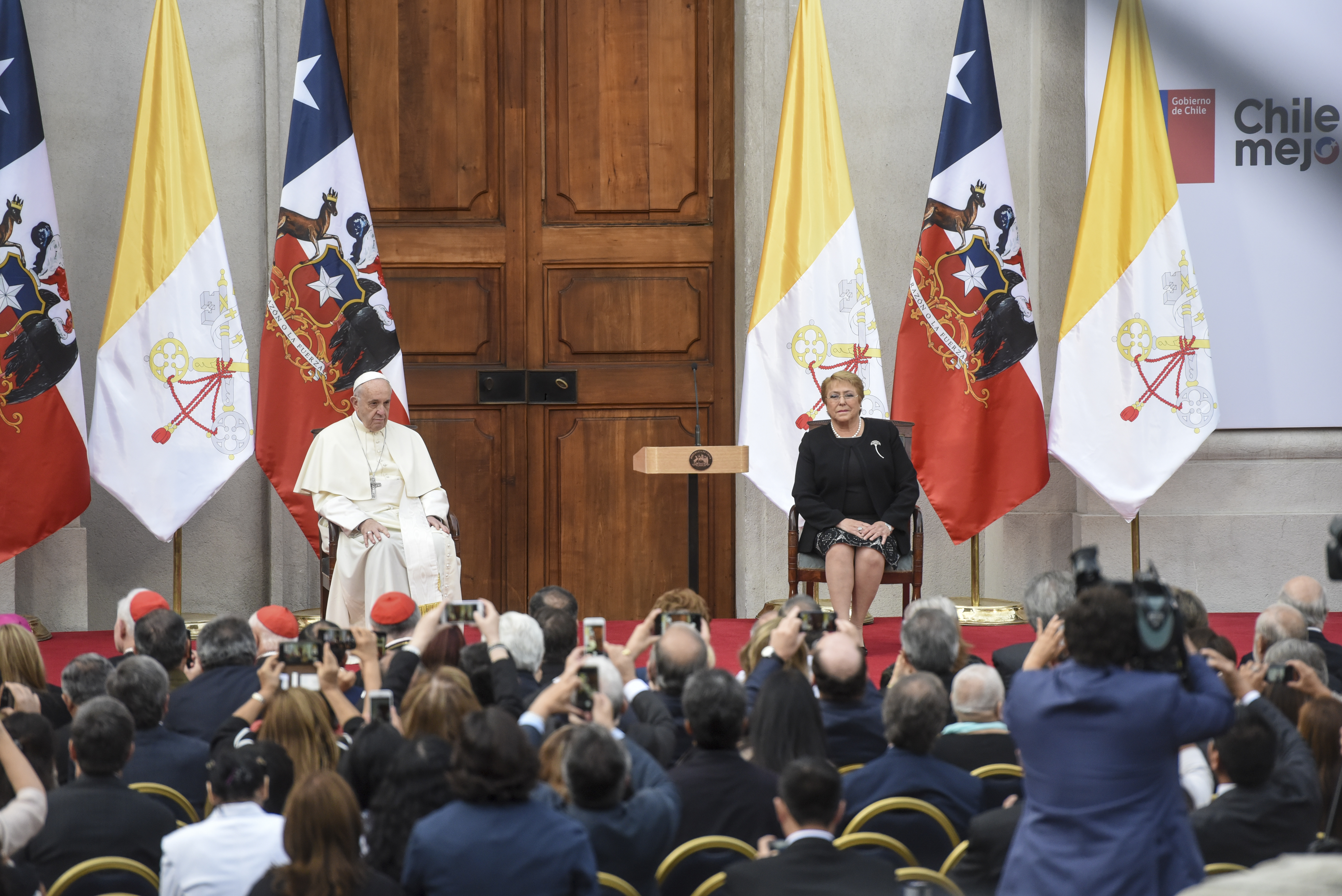 Visita del Papa Francisco a La Moneda